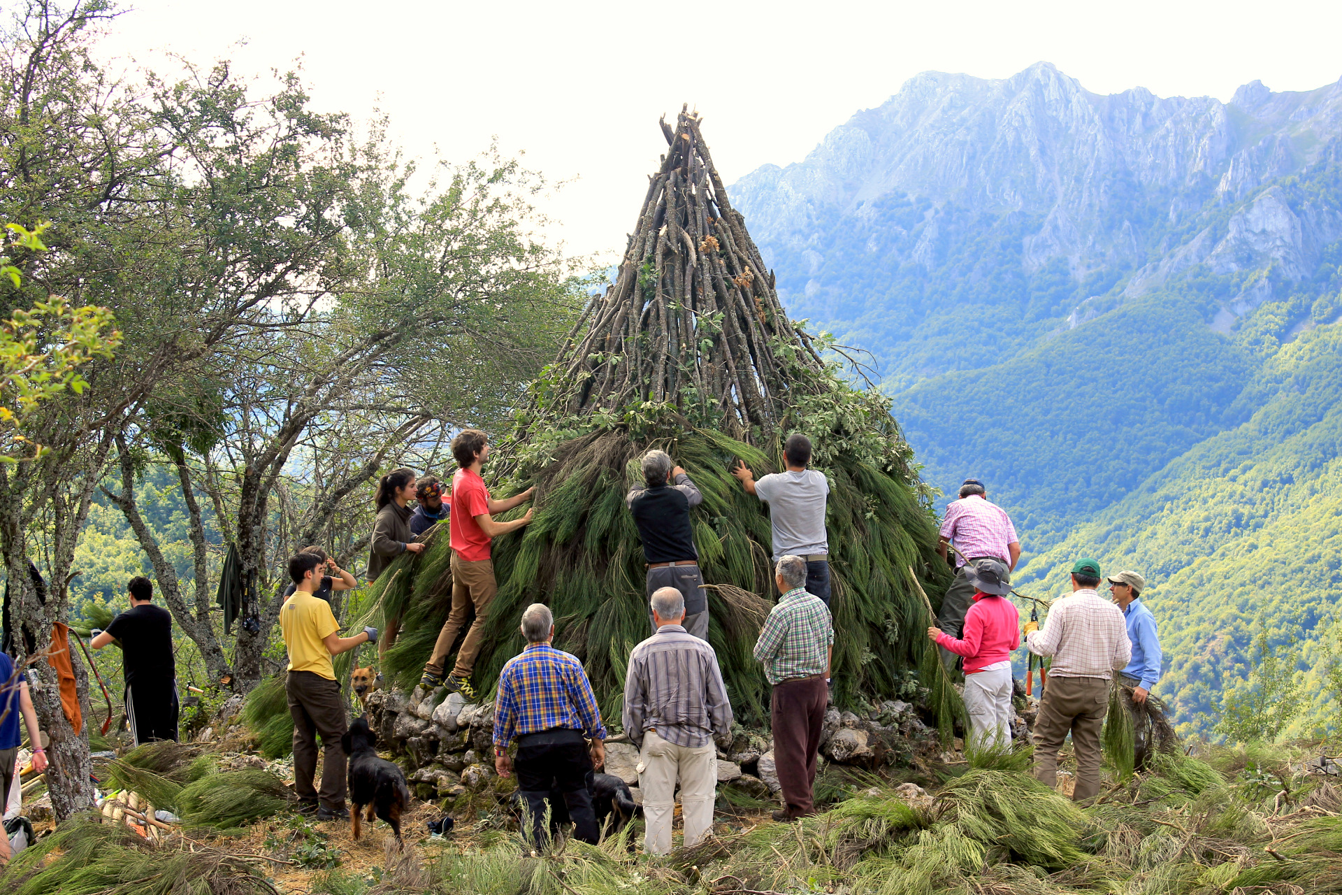 Reconstruyendo el choz pastoril de Matascalientes en a localidad leonesa de Las Salas , con la colaboración de los vecinos y vecinas del pueblo